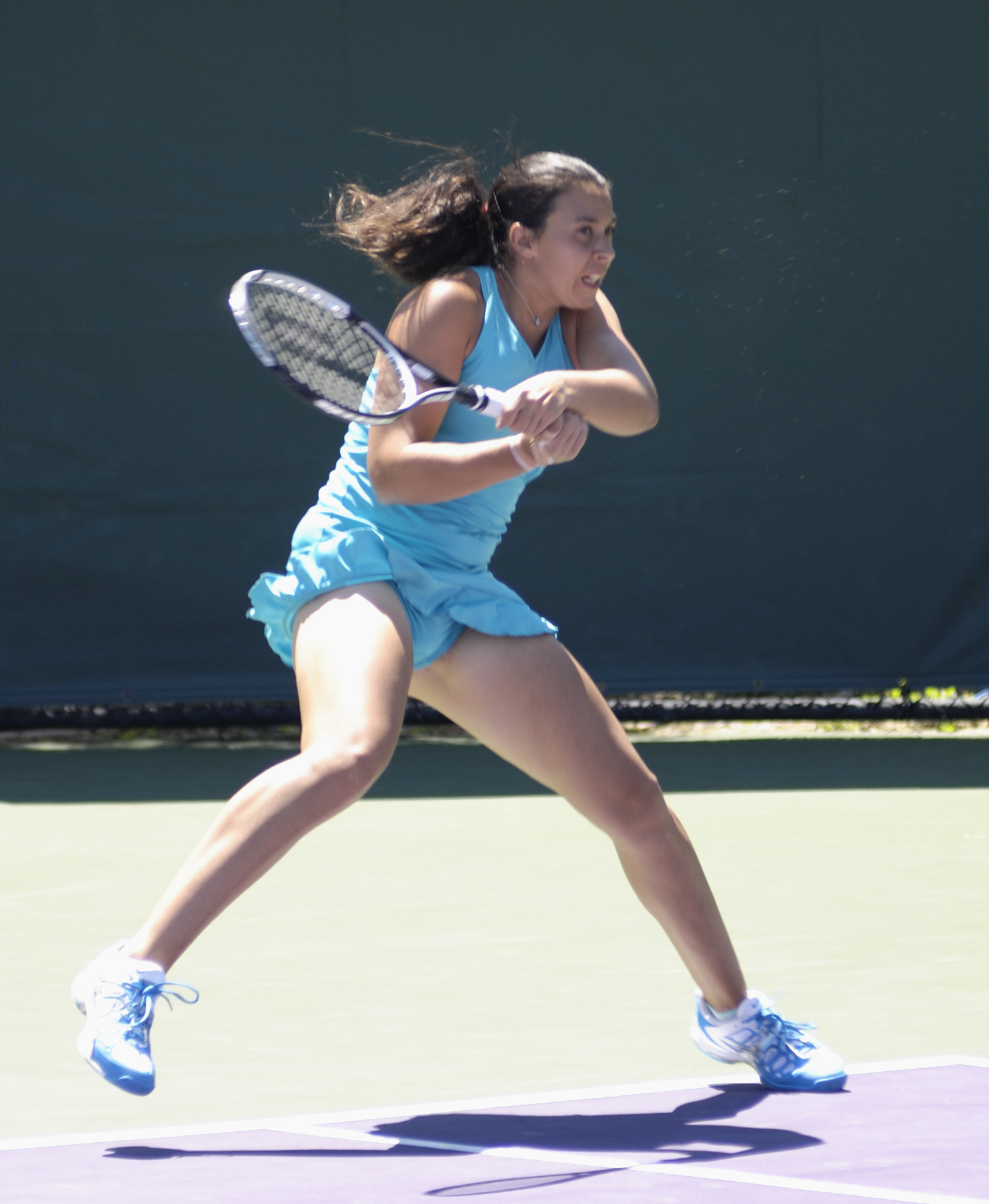 Bartoli